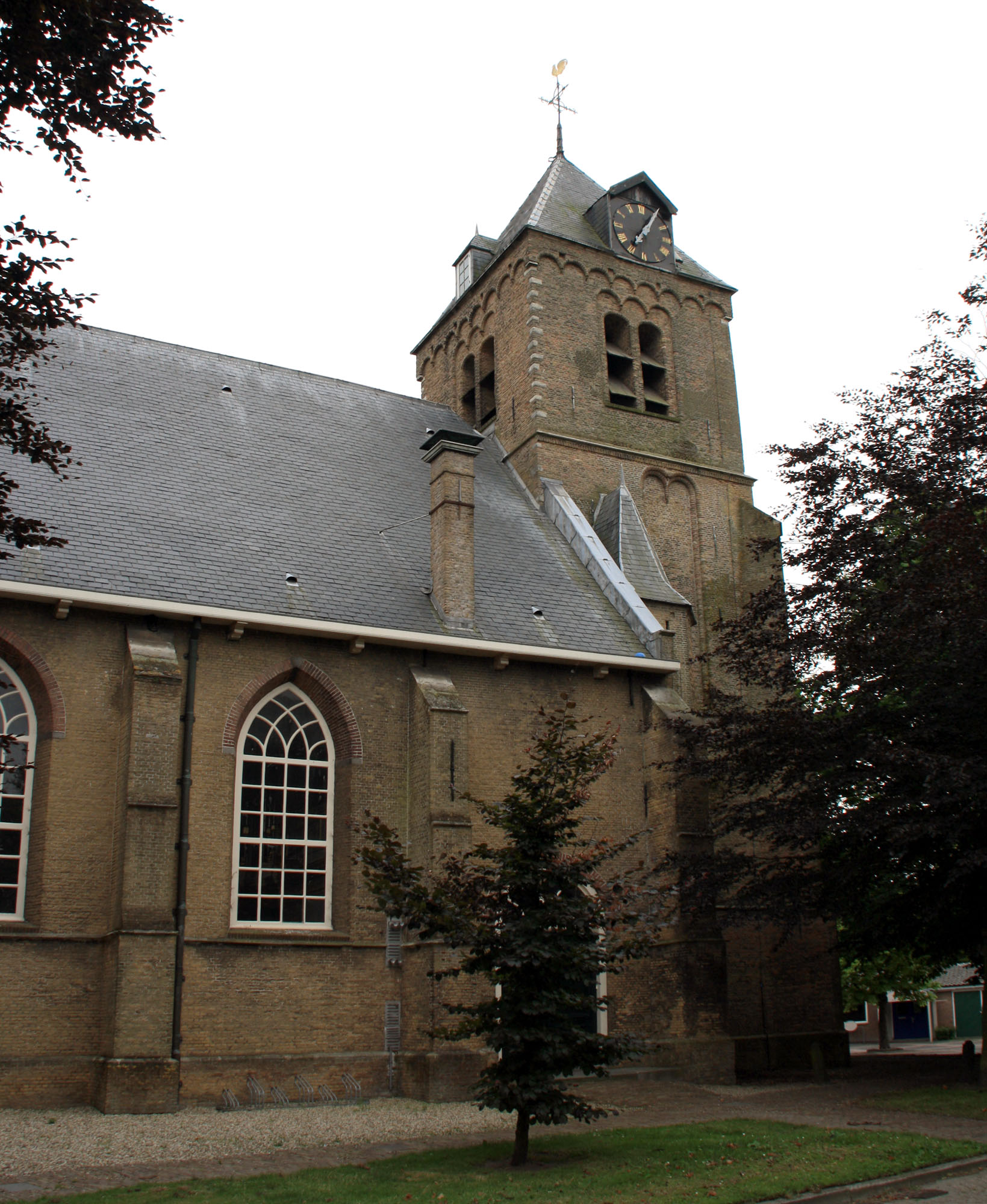 Ned. Hervormd kerk, Dorpsstraat 14 te Nieuwenhoorn (gemeente Hellevoetsluis). Schip en toren (ca. 1500) van de voormalige parochiekerk, waarvan het transept en koor zijn verdwenen. Eenbeukig schip met houten tongewelf. Rijksmonument nr 21437